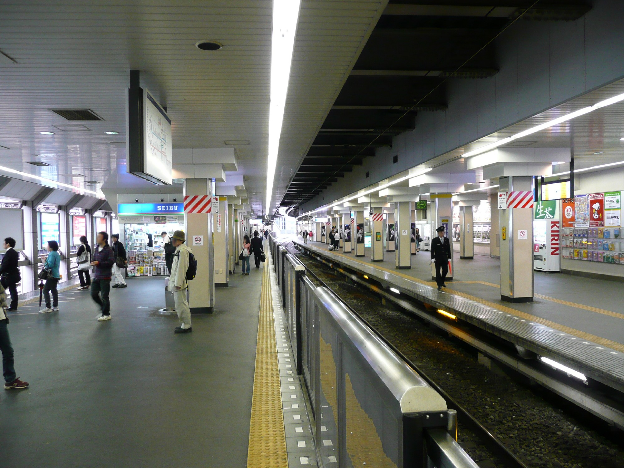 高田馬場駅西武ホーム